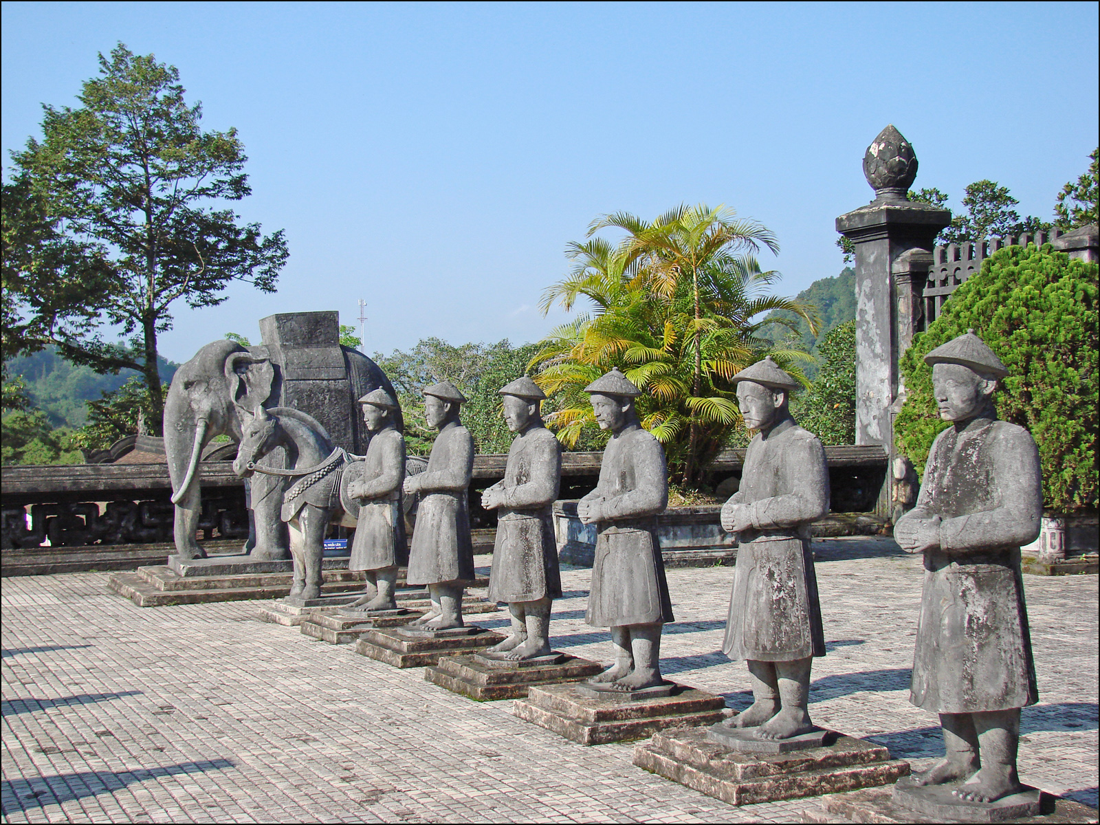 Gardes de la cour d'honneur : soldats, animaux Monté sur le trône du Vietnam en 1916, le roi Khai Dinh choisit la pente de la montagne Chau Chu (encore appelée Chau E), à 10 km de Huê, pour y bâtir son tombeau. Les travaux commencèrent le 4 septembre 1920 et se poursuivirent pendant 11 ans. Le roi étant mort en 1925, le tombeau a été terminé sous Bao Dai (1926-1945). Le tombeau est le résultat du mélange des architectures européennes et asiatiques, modernes et anciennes. Il est divisé, comme le veut la tradition, en 3 parties qui dans ce cas sont des terrasses reliées par des escaliers. La première terrasse est bordée de pavillons de garde. La deuxième terrasse comprend la cour d'honneur, des soldats, animaux et mandarins et le pavillon de la Stèle sur laquelle sont inscrits les réalisations et mérites du roi. La troisième terrasse est celle du tombeau et des salles commémoratives décorées de mosaïques, faïences et tessons de verre.